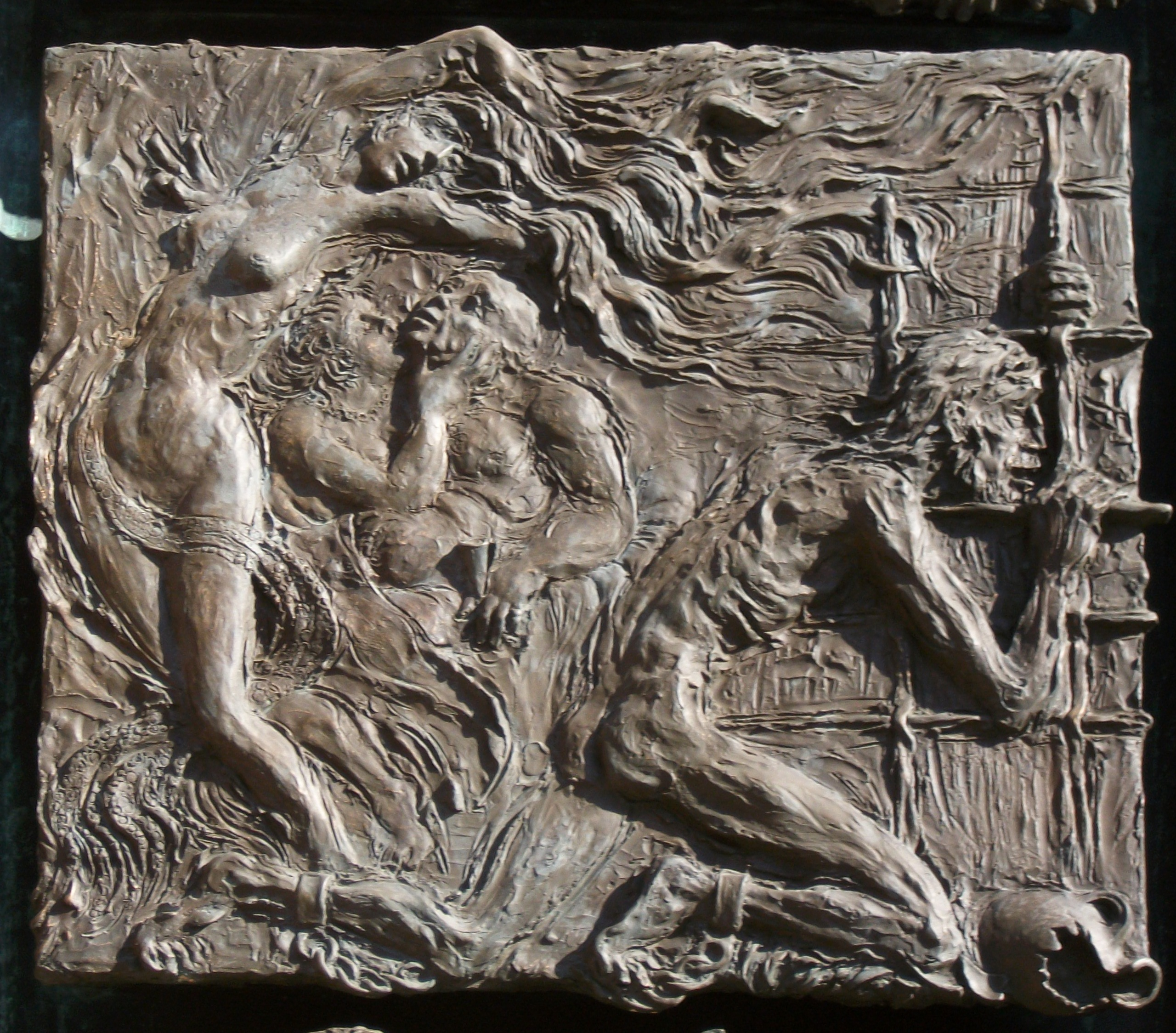 Basilika St. Johann (Saarbrücken), Bronzeportal von Ernst Alt